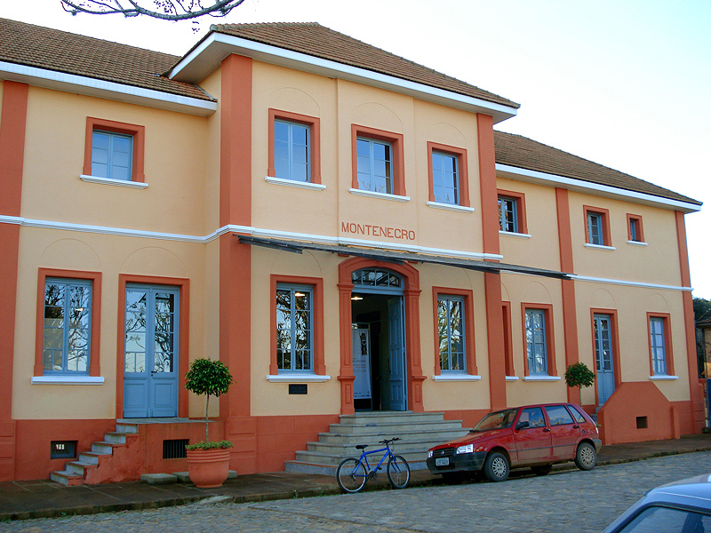 Casa da Cultura de Montenegro (Rio Grande do Sul), Brasil, instalada na antiga estação ferroviária.